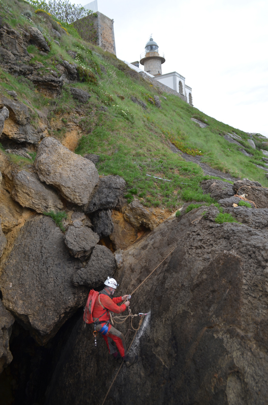 Antzoriz IV leizearen sarrera. Goian, Lekeitioko itsasargia.